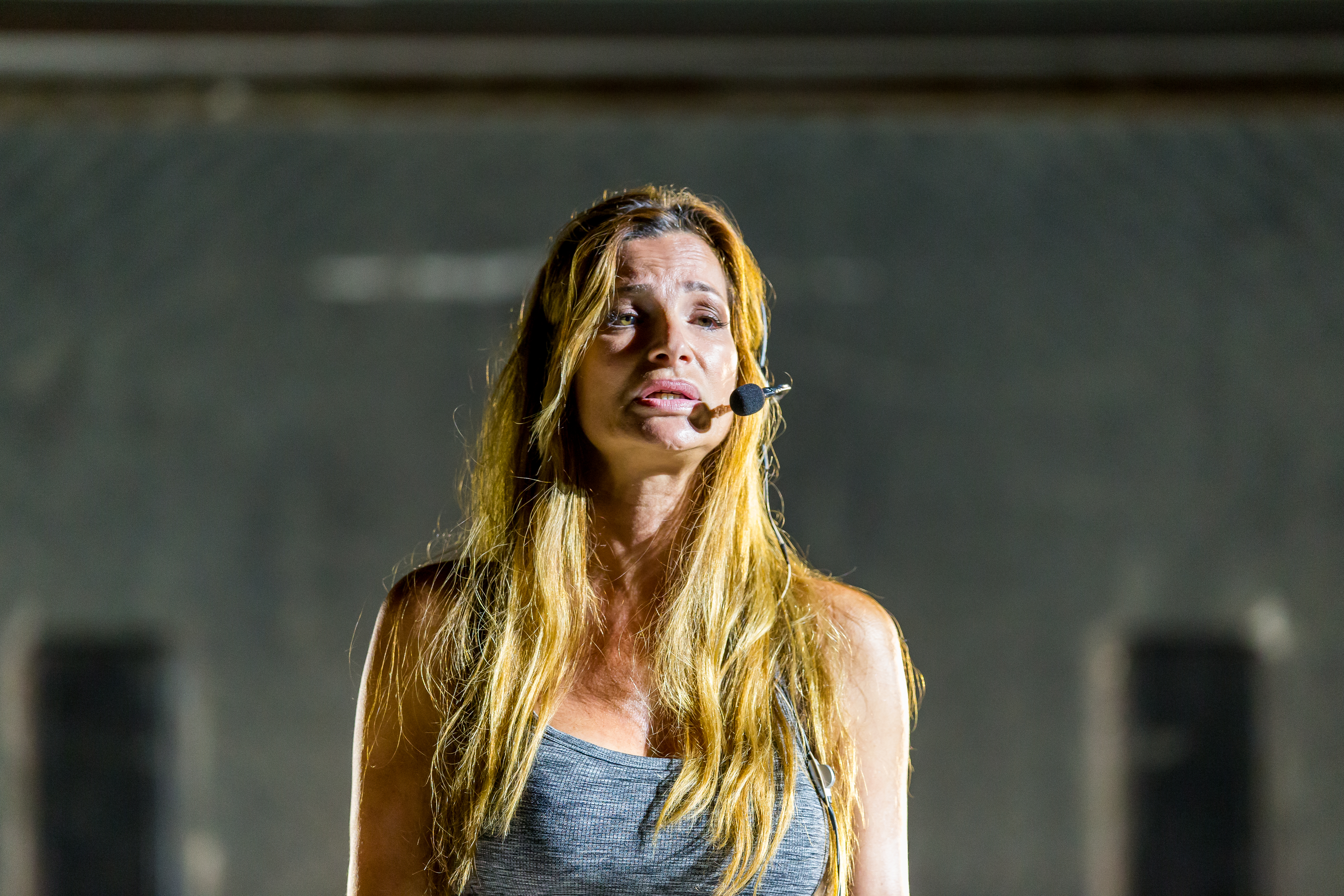 2016: Uraufführung: "GOLD. Der Film der Nibelungen" Regie: Nuran David Calis Autor: Albert Ostermaier Intendant: Nico Hofmann --- Ensemble: Produzent Konstantin Trauer: Uwe Ochsenknecht Regisseur Arsenij Kubik: Vladimir Burlakov Drehbuchautor Charlie P. Weide: Josef Ostendorf Society Reporter Peter Scheumer: Dominic Raacke Kamerafrau "the eye": Anna Rot Setdesignerin "set": Joy Maria Bai Assistentin des Produzenten Carmen: Alexandra Kamp Maskenbildnerin Sueyla Blume : Ayse Bosse die Ältere Kriemhild Karina Bergmann: Katja Weitzenböck die Jüngere Kriemhild Simone Gehel: Constanze Wächter die Ältere Brünhild Lotte Jünger: Michaela Steiger die Jüngere Brünhild Nathalie Aurun: Dennenesch Zoudé Siegfried Mohamad Söder: Ismail Deniz Hagen René Inner: Sascha Göpel Gunther Klaus Castel: Maximilian Laprell Bürgermeister Franz Koppoler: Heiner Lauterbach during Nibelungenfestspiele "GOLD. Der Film der Nibelungen" at Wormser Kaiserdom, Worms, Rheinland Pfalz, Germany on 2016-07-12, Photo: Sven Mandel